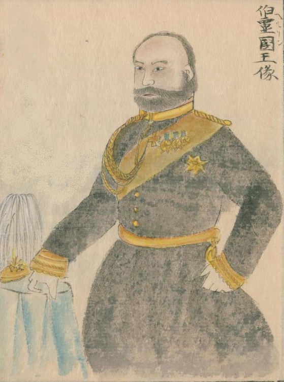 プロセイン王 ヴィルヘルム1世 (ドイツ皇帝) 高嶋祐啓『欧西行紀』